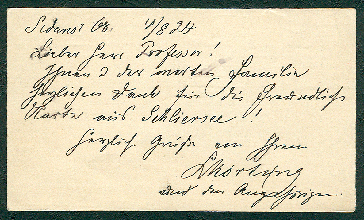 Versuch einer Abschrift der Handschrift (mit der Bitte um Korrektur/Ergänzung): „Sedanstraße 68 / 4/8/24 Lieber Herr Professor (Georg Herting! Ihnen und der werten Familie / herzlichen Dank für die freundliche Karte aus Schliersee! Herzliche Grüße von Ihrem L Körting und den Angehörigen“ Anmerkung: Ob die angegebene Hausnummer 1:1 auf die heutige übertragbar ist, ist noch nicht zweifelsfrei festgestellt. Eine Überprüfung im entsprechenden Adressbuch Hannovers von 1924 kann darüber Aufschluß geben. Auch eine Begehung/Befragung vor Ort könnte hilfreich sein ebenso wie die Mitwirkung der Freimaurer-Loge Zum Schwarzen Bär. Möglicherweise mögen auch die Nachkommen Leonard Körtings weitere Belege und Auskünfte beisteuern.